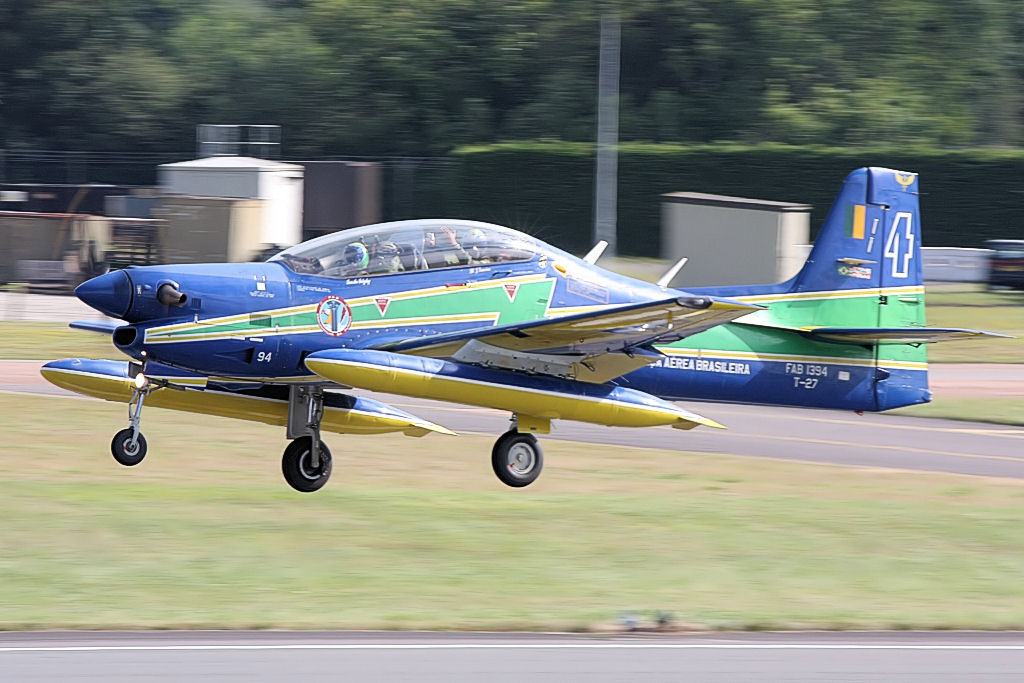 Esquadrilha da Fumaca Tucano - RIAT 2008